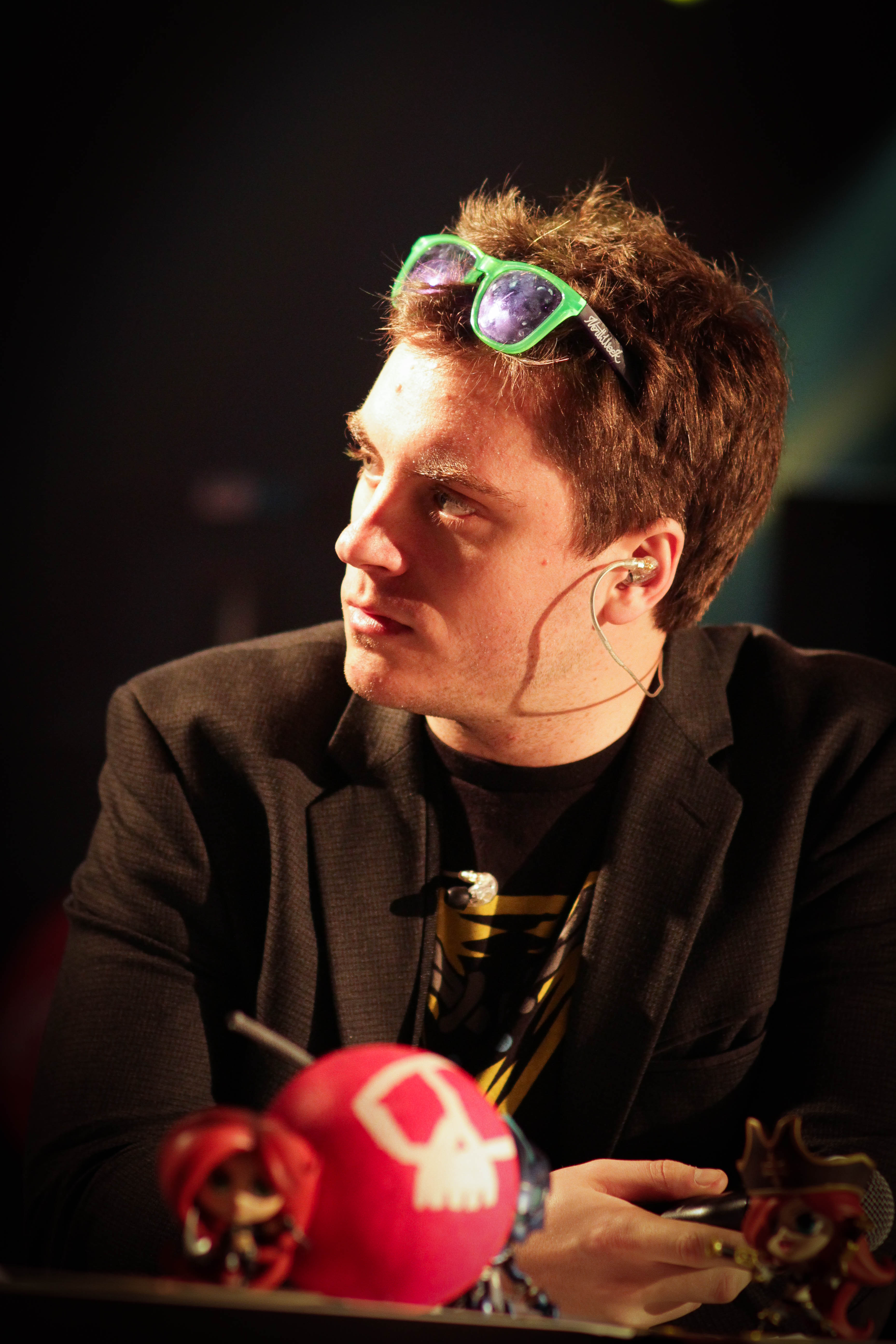 ZeratoR.